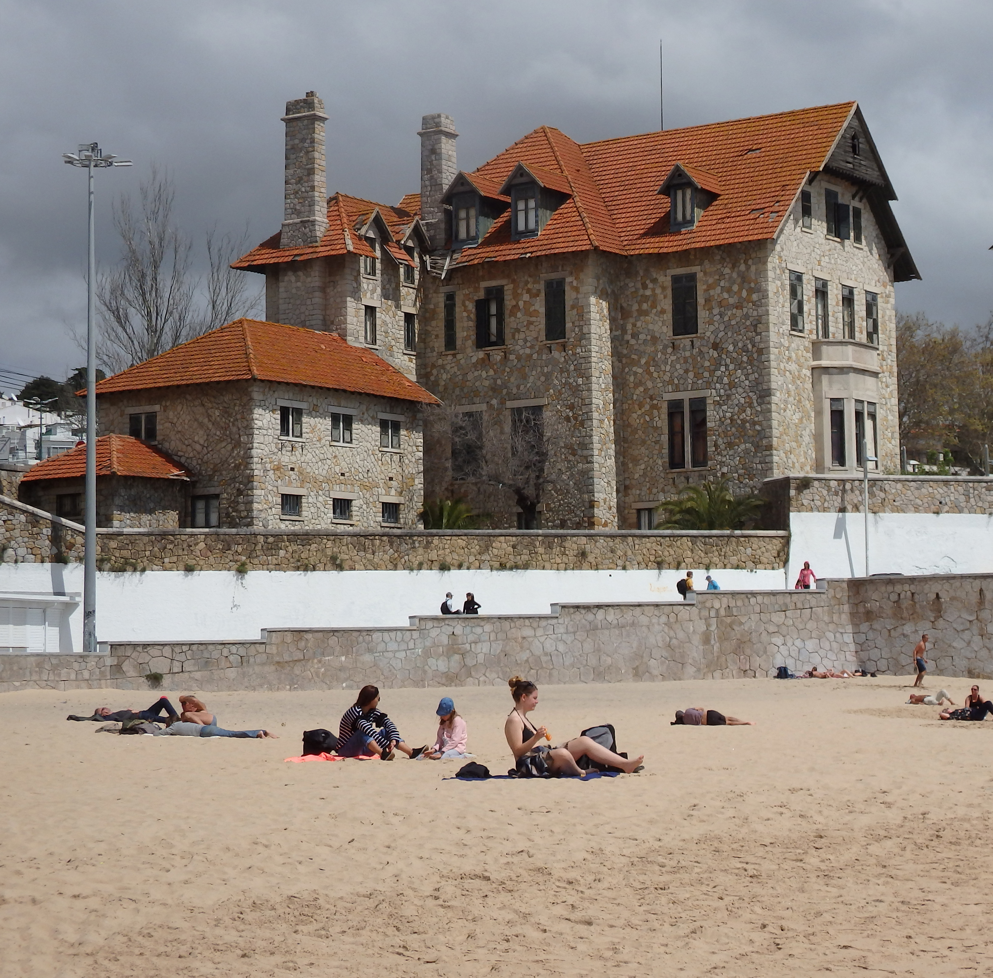 Portugal